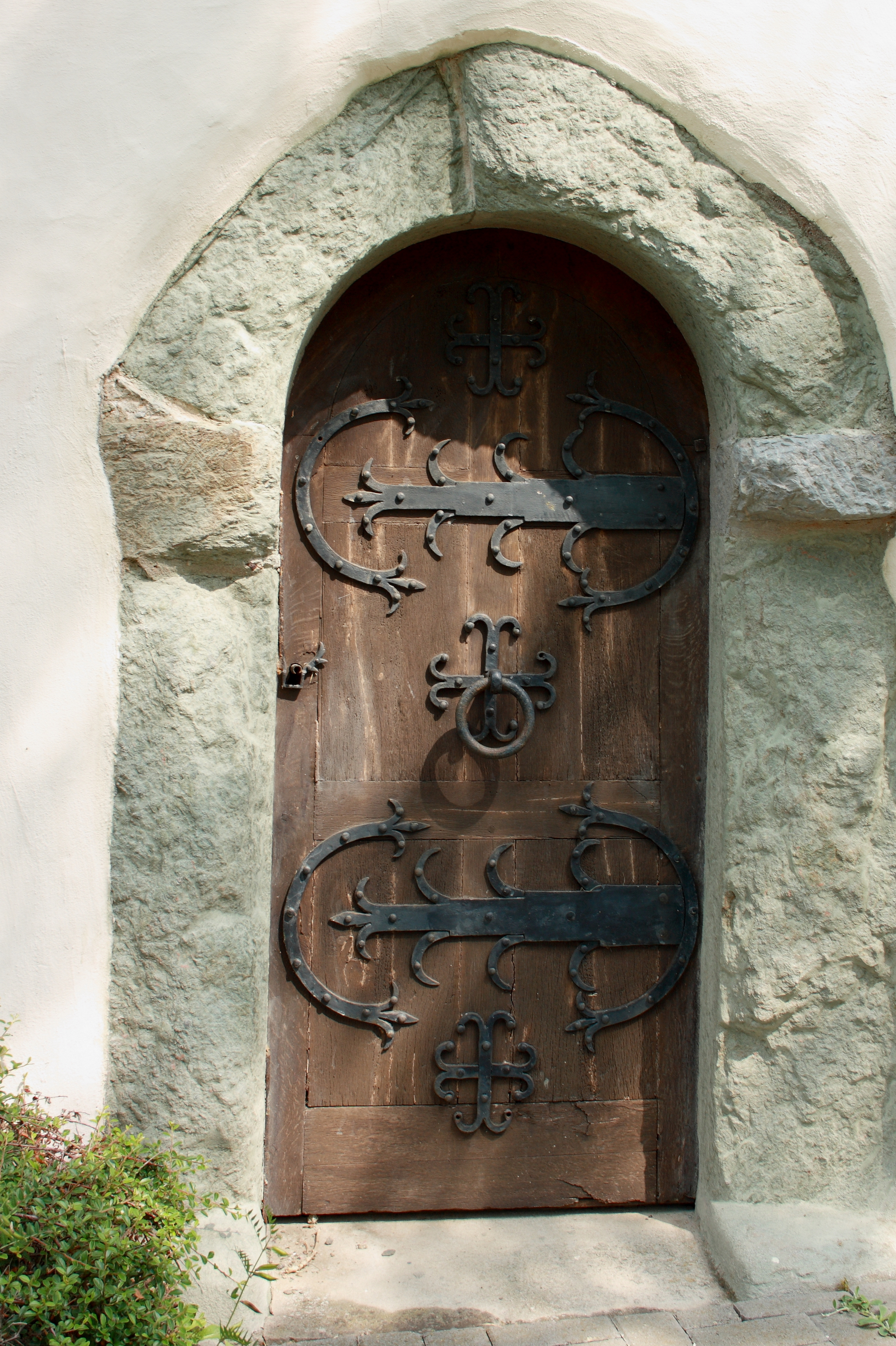 Evangelische Friedhofskirche St. Georgen, St.-Georg-Straße 19, Braunfels, Lahn-Dill-Kreis (Hessen), romanisches Portal an der Südseite mit mittelalterlichen Beschlägen